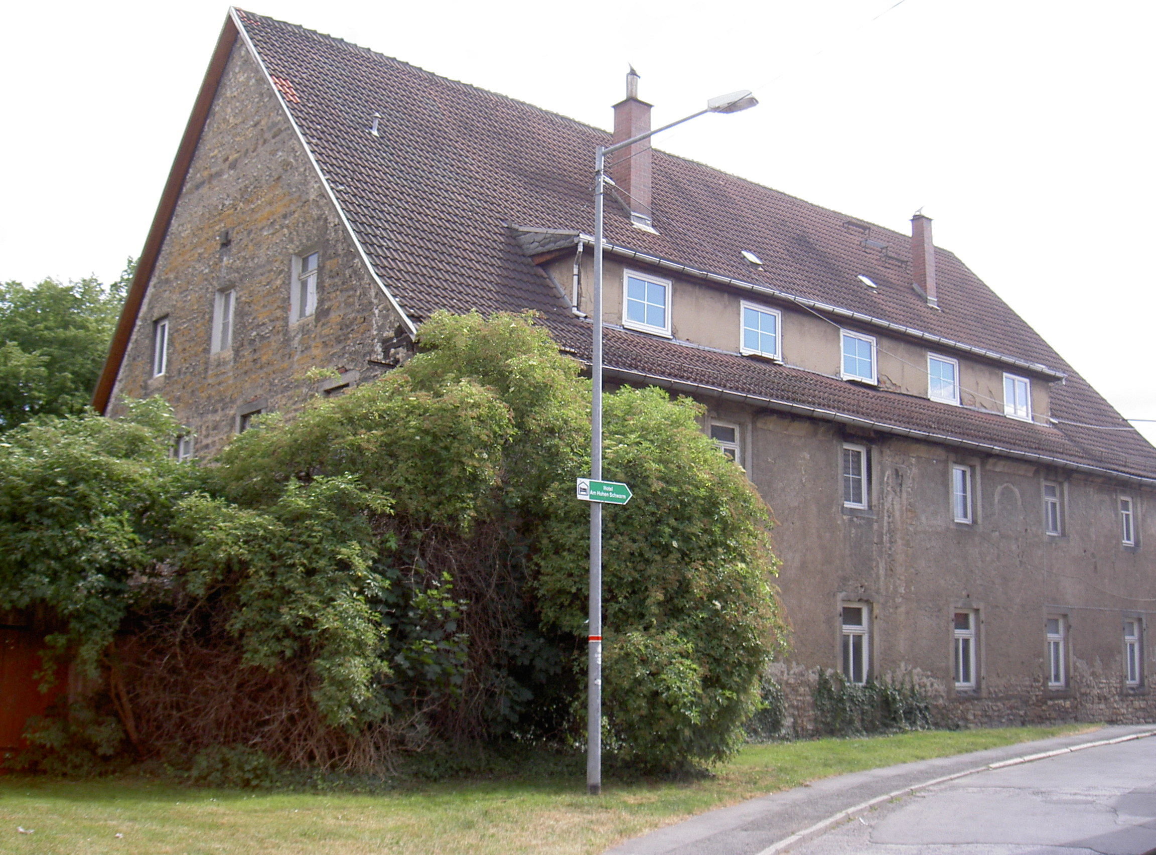 Saalfeld St. Nikolai